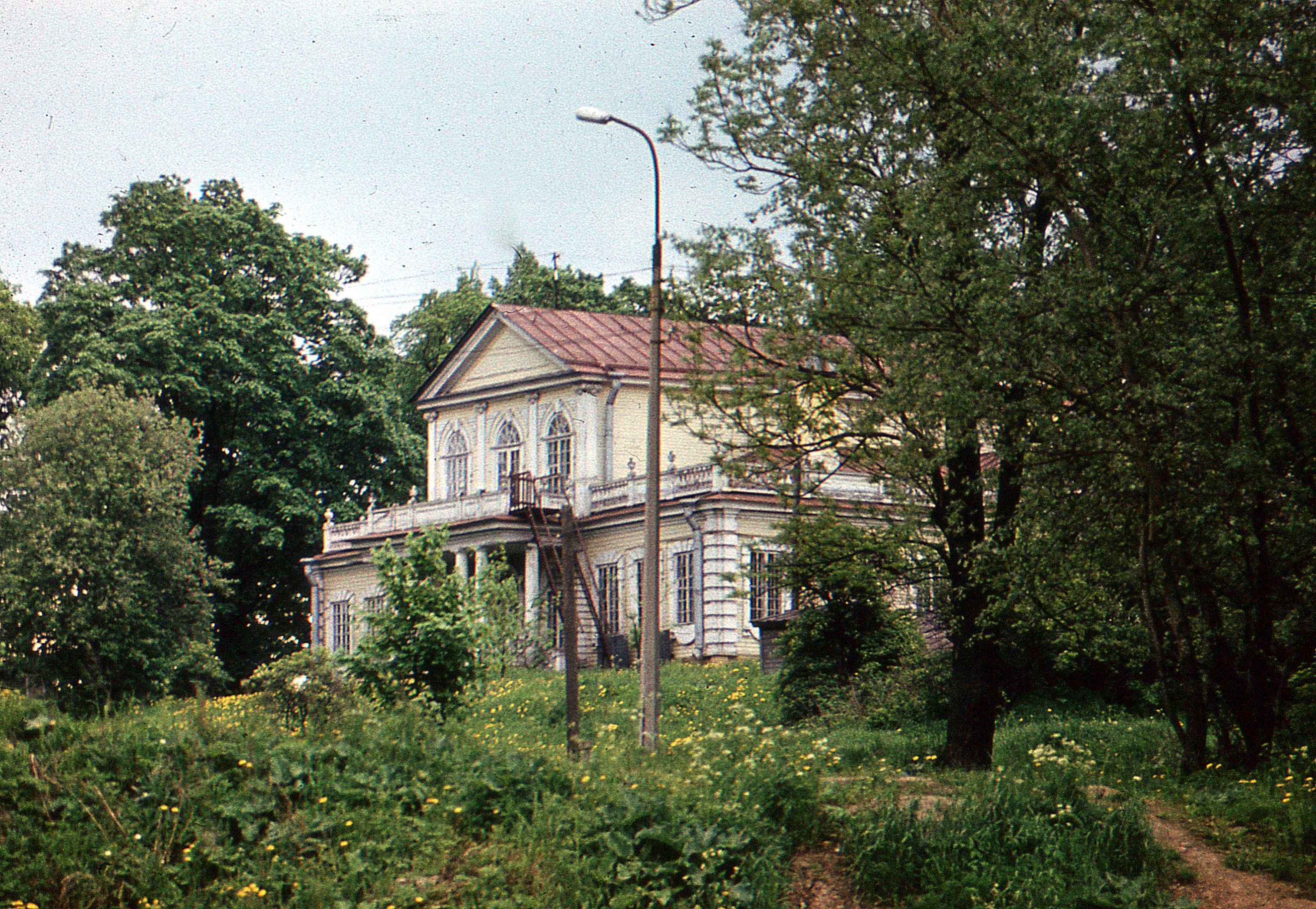 Путевой дворец Петра Первого в Стрельне